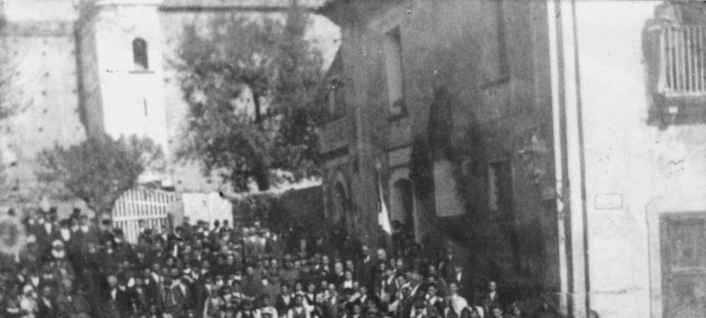 Ex caserma di Girifalco. Negli anni 20 del '900 al suo posto fu edificato il palazzo Municipale.